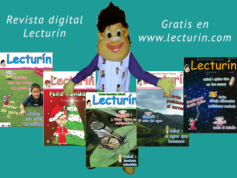 Revista digital infantil LECTURIN con el personaje Lecturín